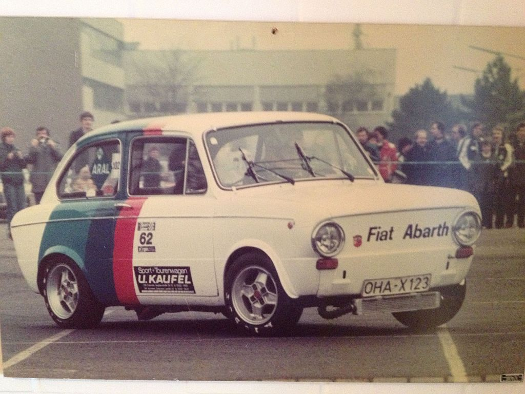 Uwe Kaufel im Fiat Abarth 850 Special